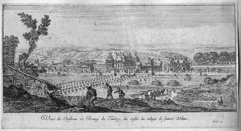 Veuë du Chasteau et Bourg de Tanlay, du coste du vilage de sainct Vilmé